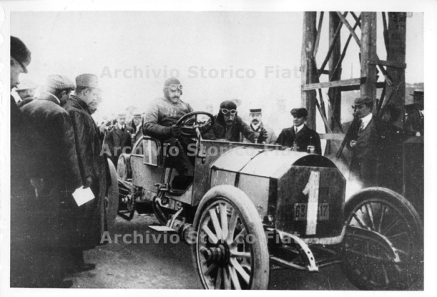 Fotografia di Vincenzo Lancia alla guida di una Fiat 28-40 HP Corsa al circuito di Brescia per la Targa Florio (Fiat Group Marketing & Corporate Communication spa, Archivio e centro storico Fiat, Lancia, Foto Piloti, Corse, 31)